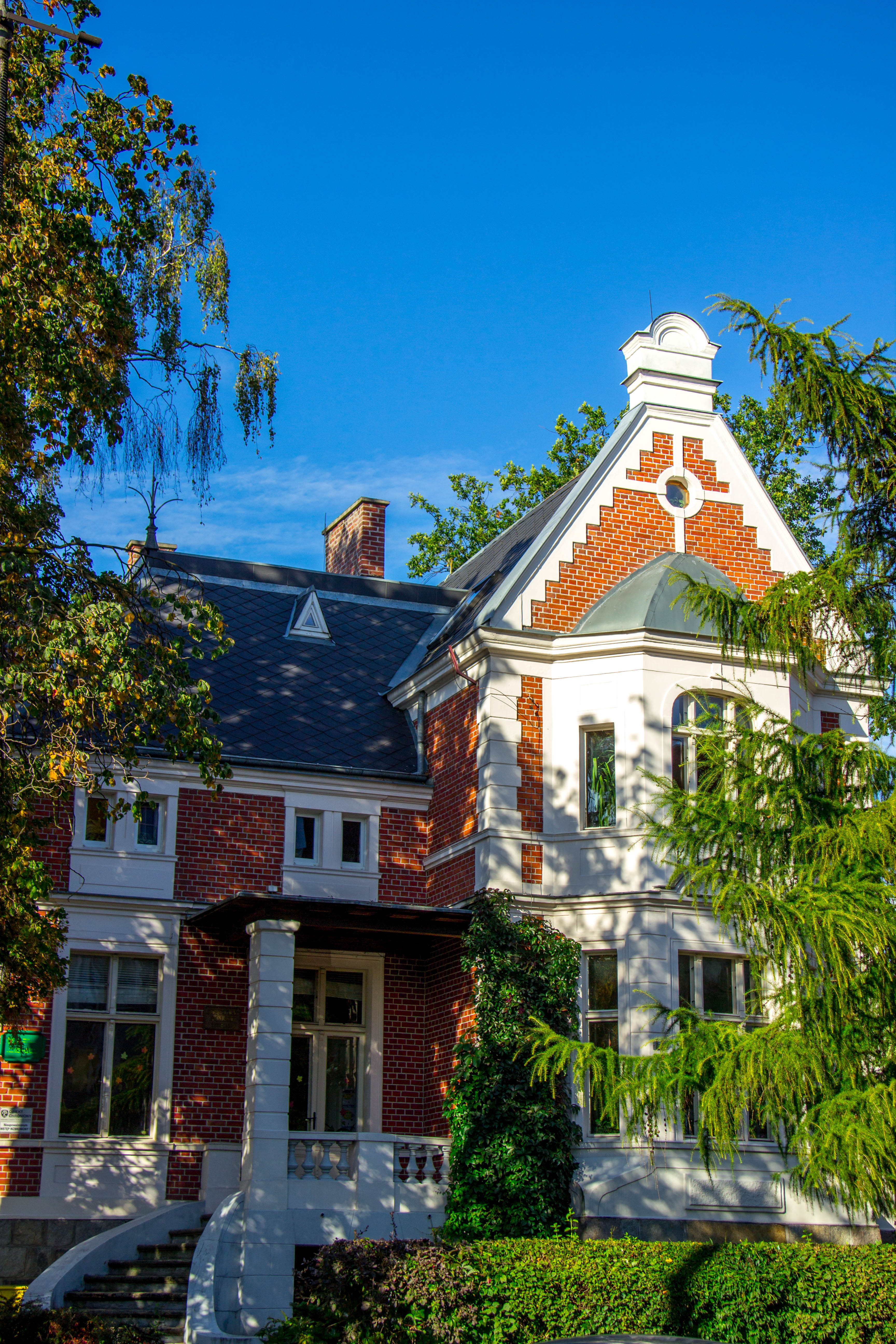 Kwidzyn, ul. Braterstwa Narodów 65 - dawna siedziba Konsulatu Polskiego, obecnie Przedszkole Miejskie nr 1, pocz. XX